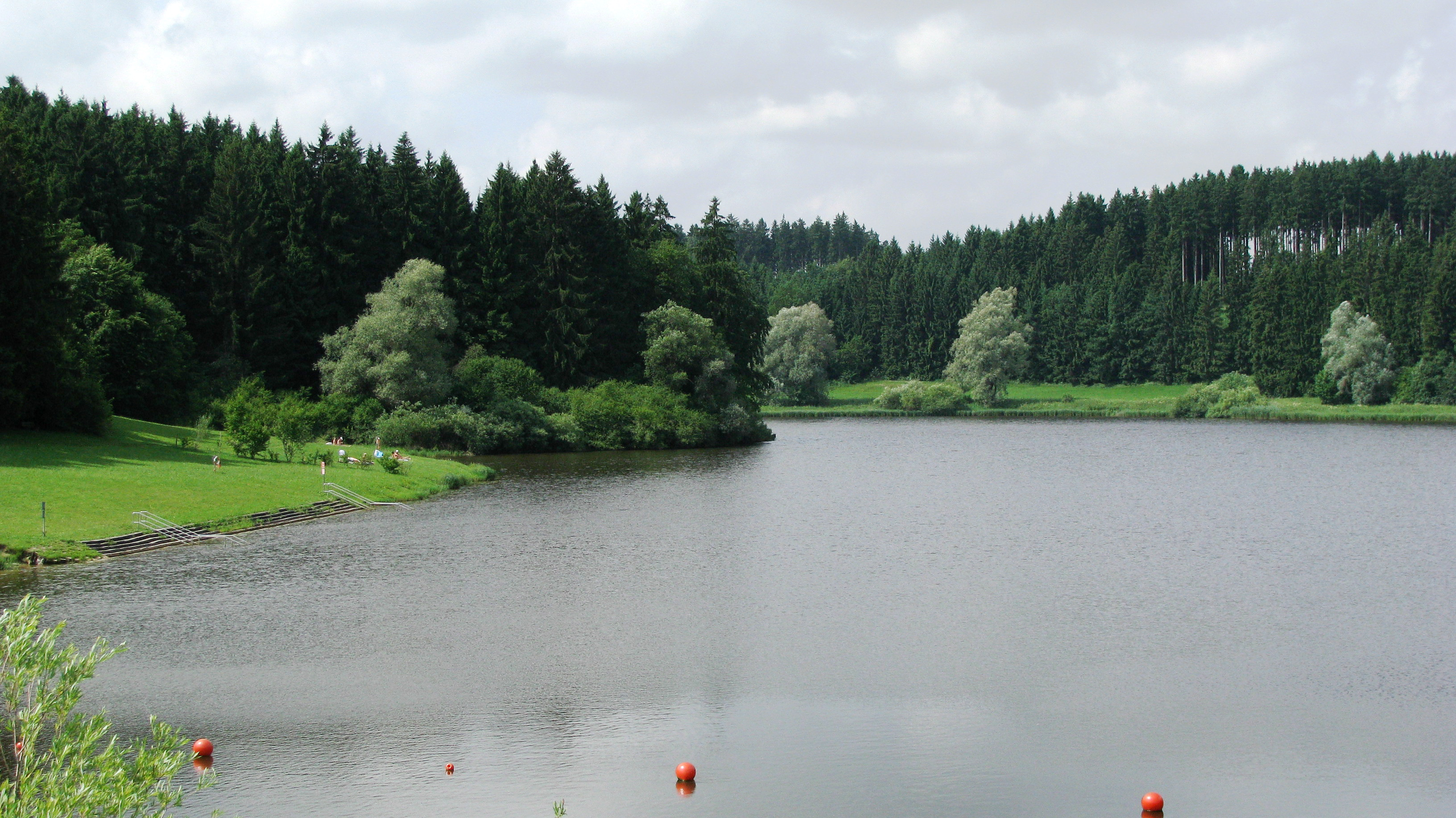 Der Windachspeicher